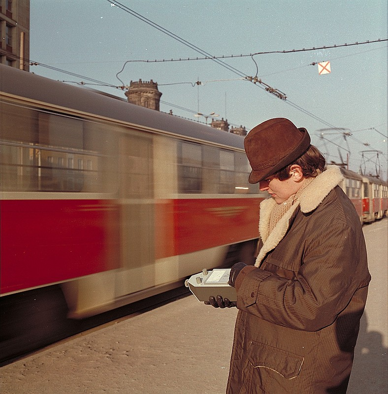 Original image description from the Deutsche Fotothek Verkehrslärmmessung